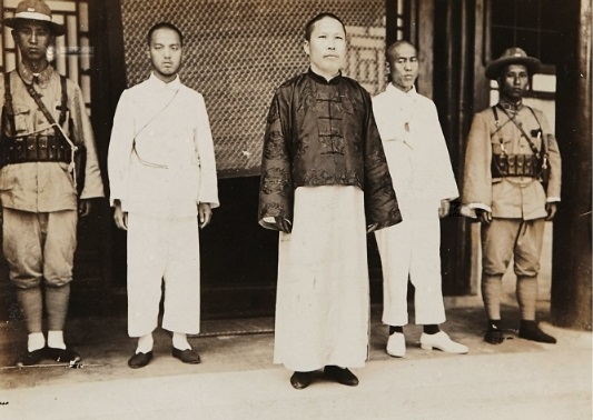 杨文恺 银盐照片